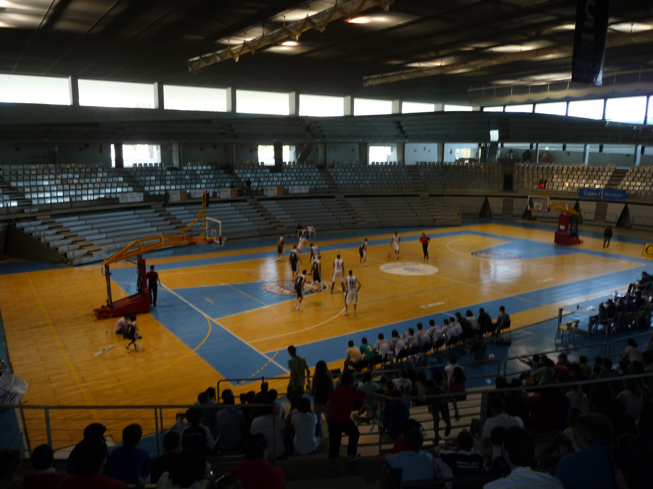 Chapin-Jerez-p1020551.jpg